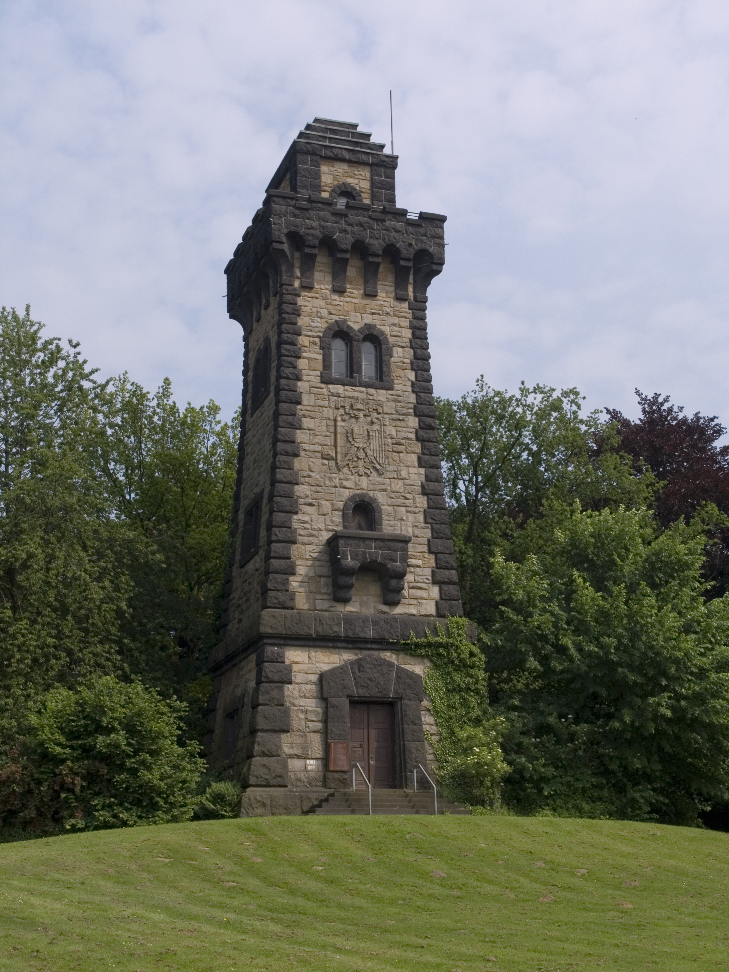 Северный Рейн-Вестфалия, Мюльхайм-на-Руре - башня Бисмарка